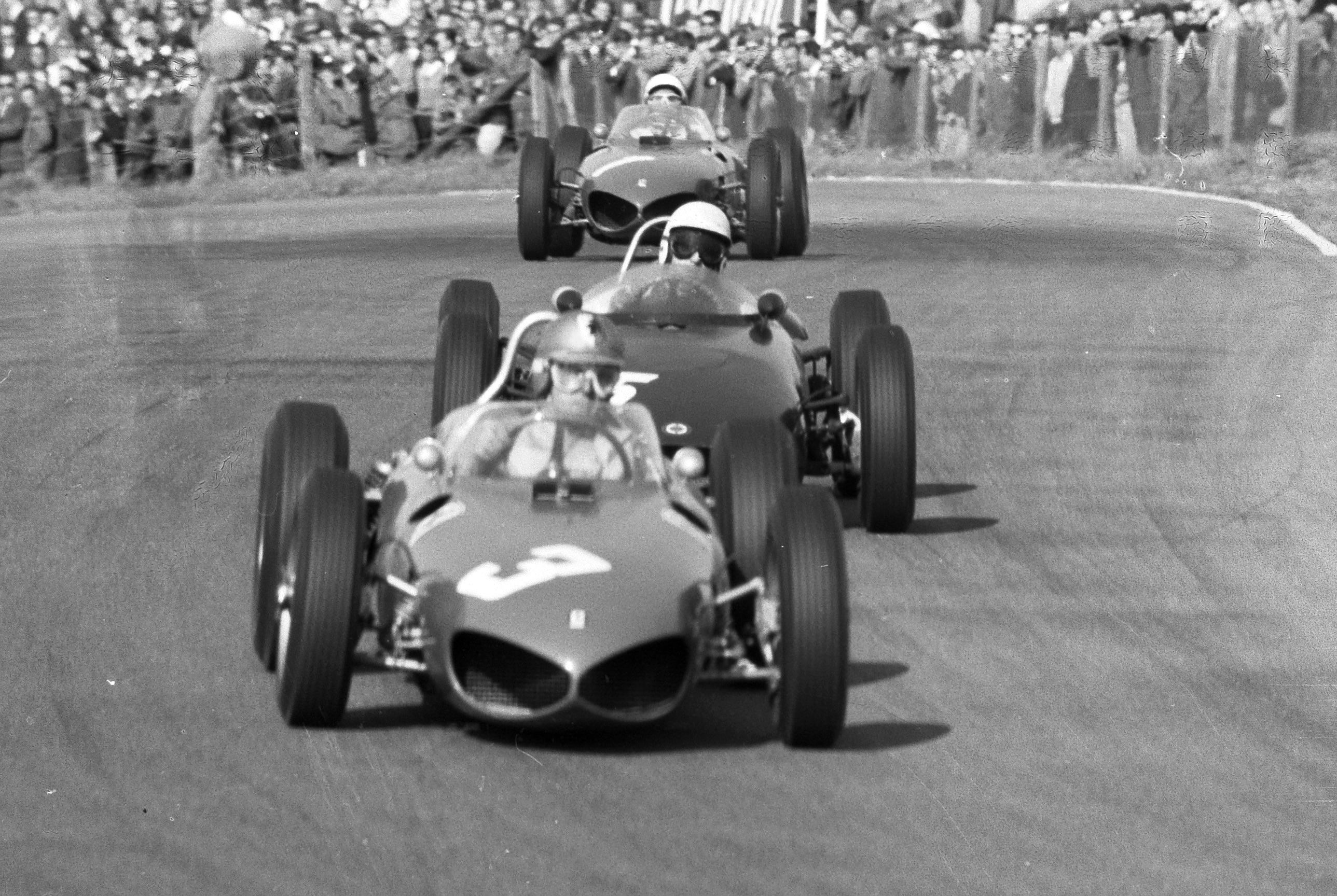 Grand Prix te Zandvoort. Von Trips , Jim Clark , Phil Hill.